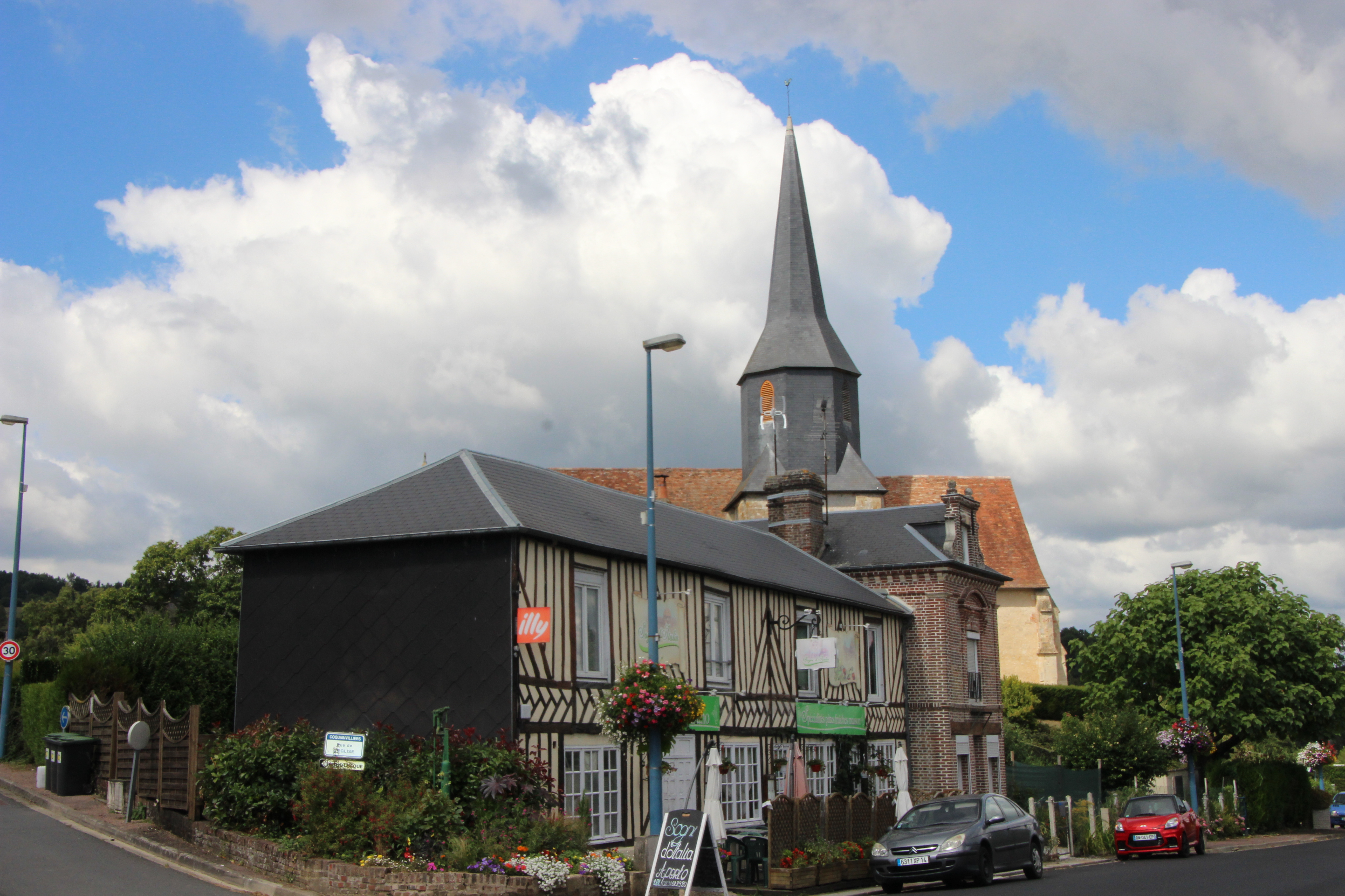 église Coquainvilliers et maison augeronne